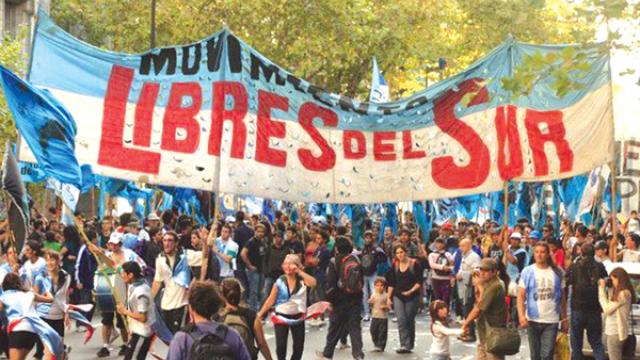 Movilización en CABA